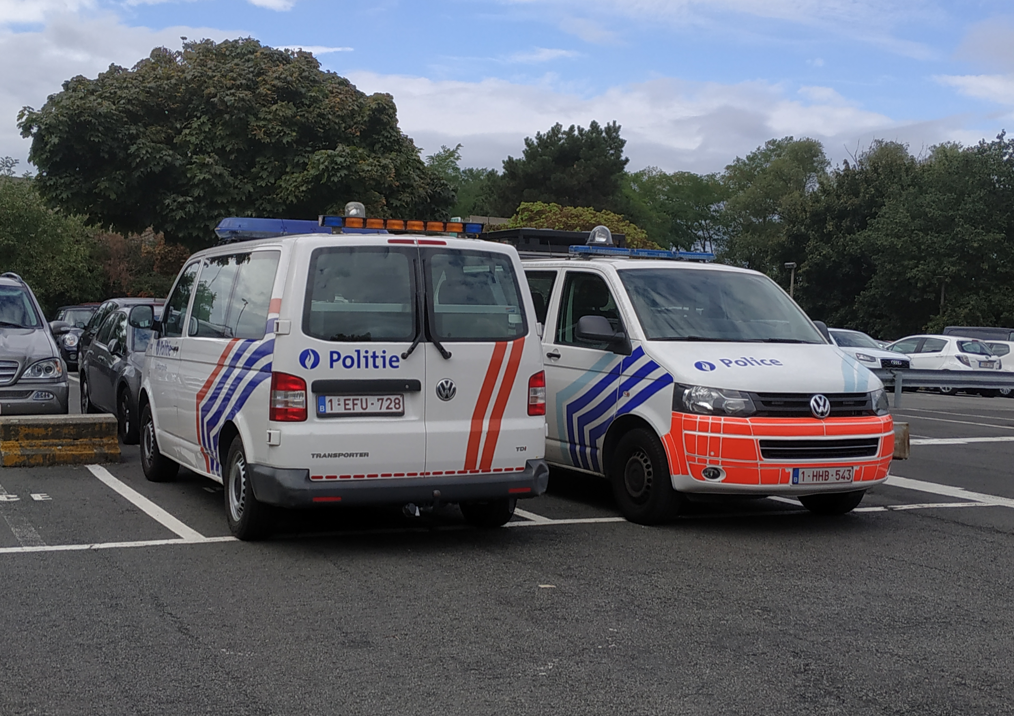 Deux Volkswagen Transporter de la police Belge : à gauche, un véhicule de la police fédérale reconnaissable à ses bandes ocre/orange, à droite un véhicule de la police locale.